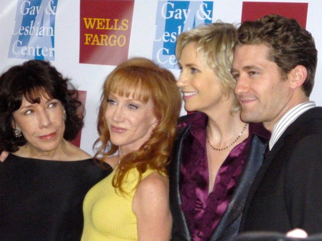 Lily Tomlin, Kathy Griffin, Jane Lynch y Matthew Morrison.